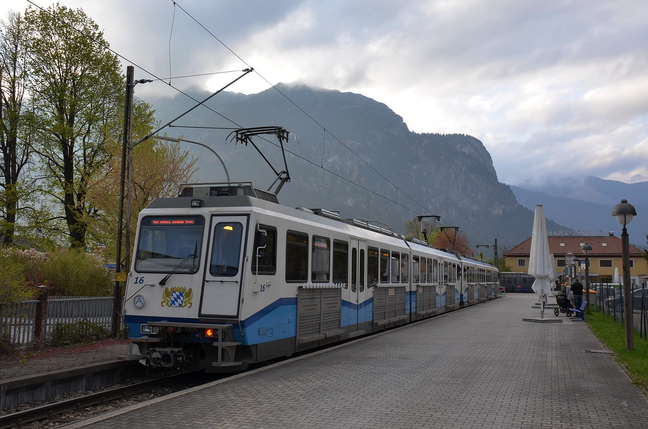 Beh 6/6